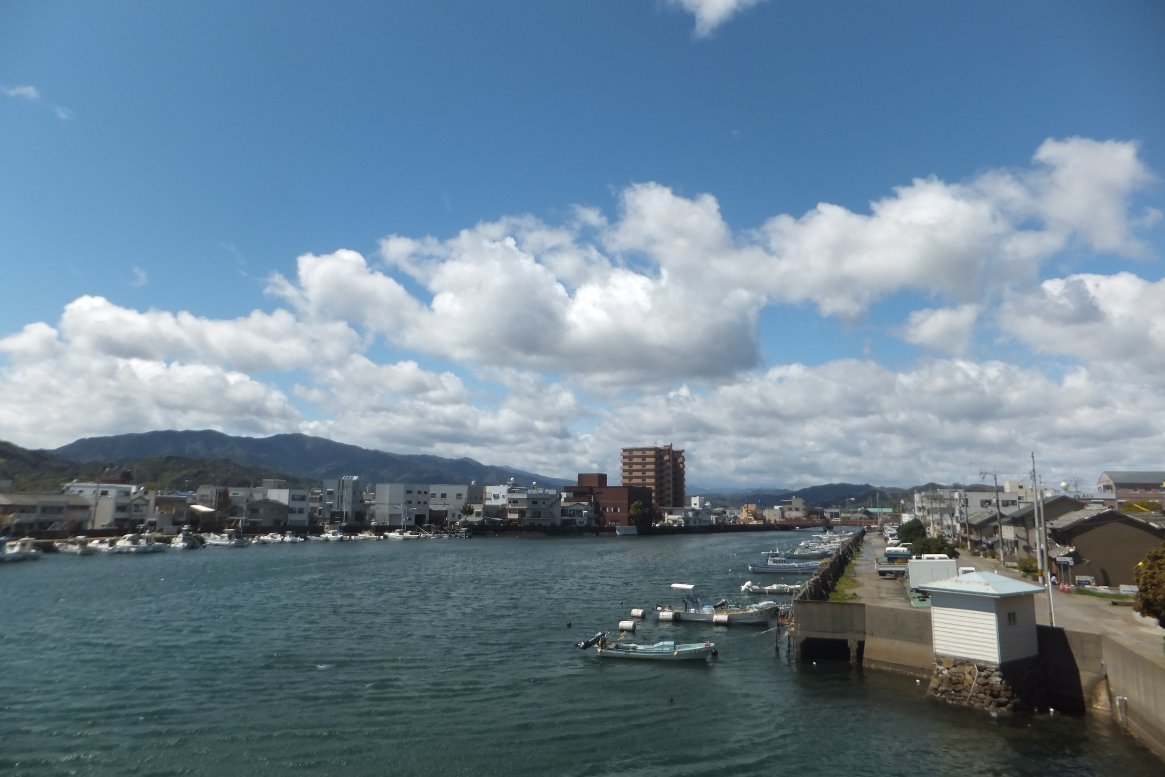 徳島県小松島市小松島町外開 神田瀬川